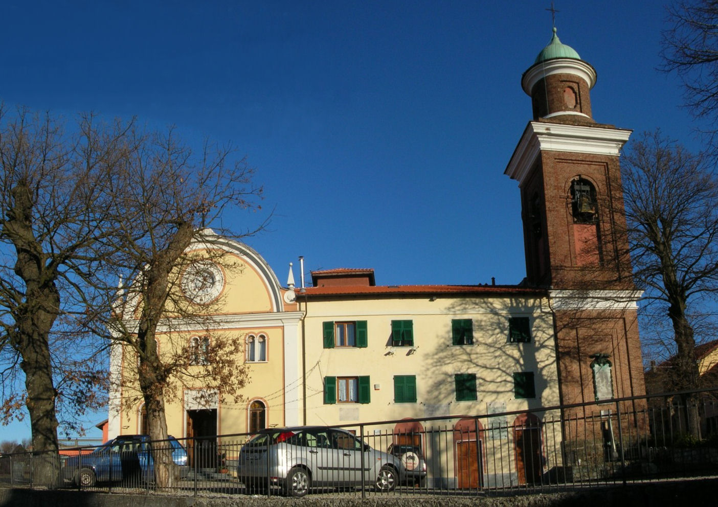 Santuario di N.S. della Vittoria (Mignanego - Genova) Foto propria Dicembre 2008 Licensing Categoria:Chiese di Mignanego